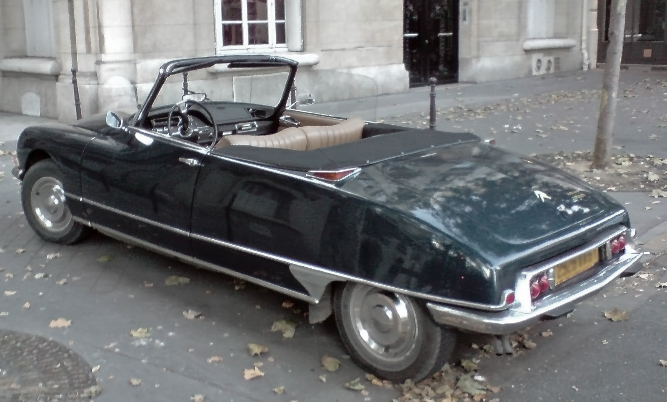 sur une avenue près du boulot...